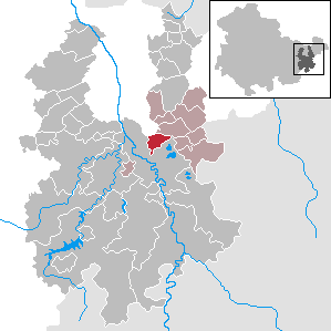 Endschütz in Thuringia - District Greiz